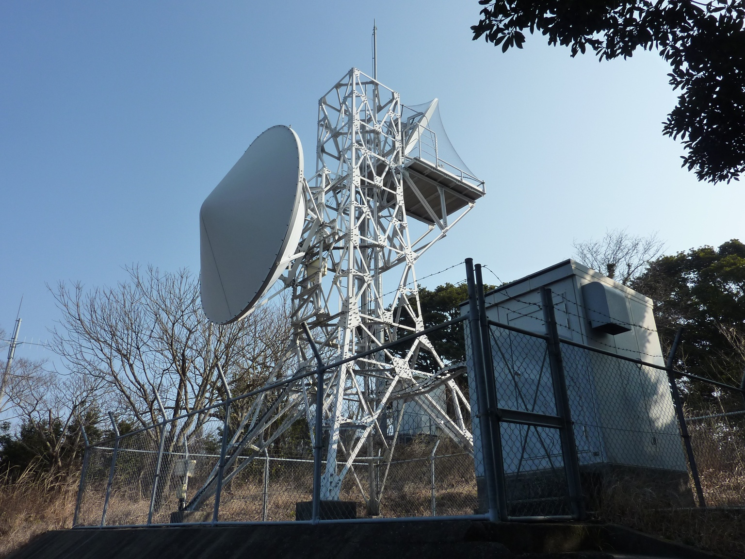 高平山（こびらやま）山頂にケーブルメディアワイワイが設けたKKT/KABアナログ受信点。